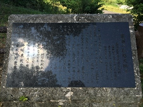 富盛のシーサーの石碑